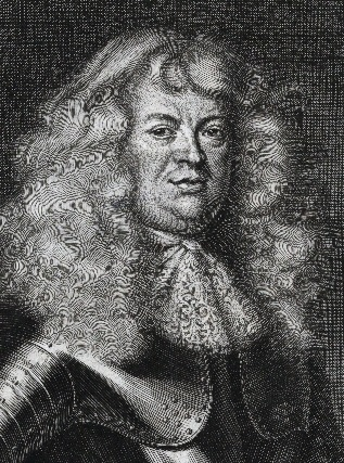 Matthäus Merian d. J.: Porträt des Landgrafen Ernst von Hessen-Rheinfels-Rotenburg